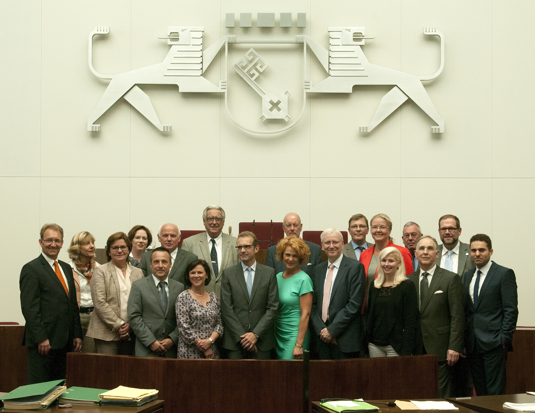 Landtagsprojekt Bremische Bürgerschaft CDU-Fraktion